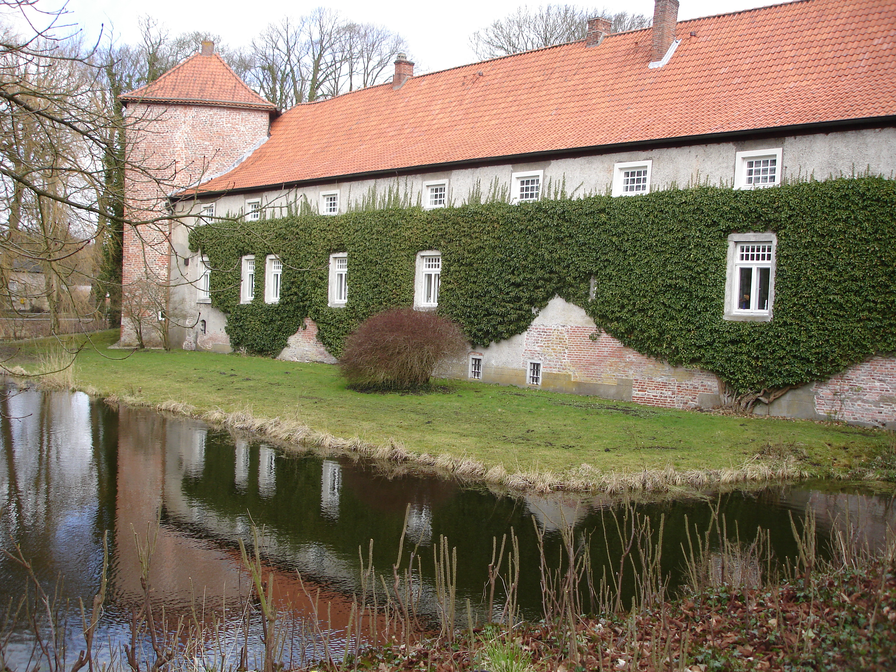 Burg Berum